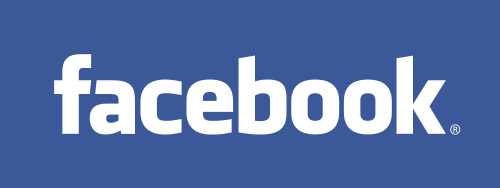 Facebook logo